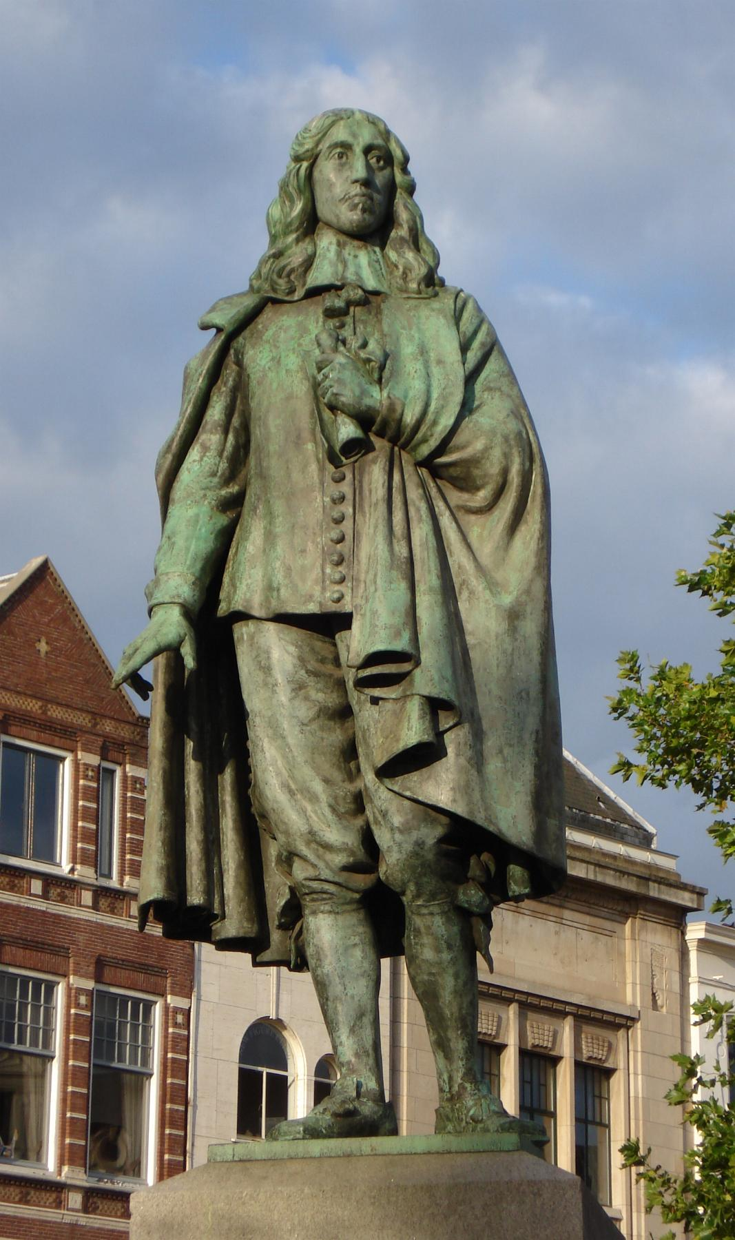 Den Haag, Plaats (bij Buitenhof). Kunstwerk "Johan de Witt" van Frederik Engel Jeltsema. The Hague/The Netherlands.